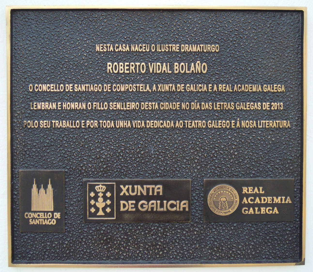 Placa na casa natal de Roberto Vidal Bolaño en Vista Alegre (Santiago de Compostela), co seguinte texto:Nesta casa naceu o ilustre dramaturgoRoberto Vidal BolañoO Concello de Santiago de Compostela, a Xunta de Galicia e a Real Academia Galegalembran e honran o fillo senlleiro desta cidade no Día das Letras Galegas de 2013polo seu traballo e por toda unha vida dedicada ao teatro galego e á nosa literatura